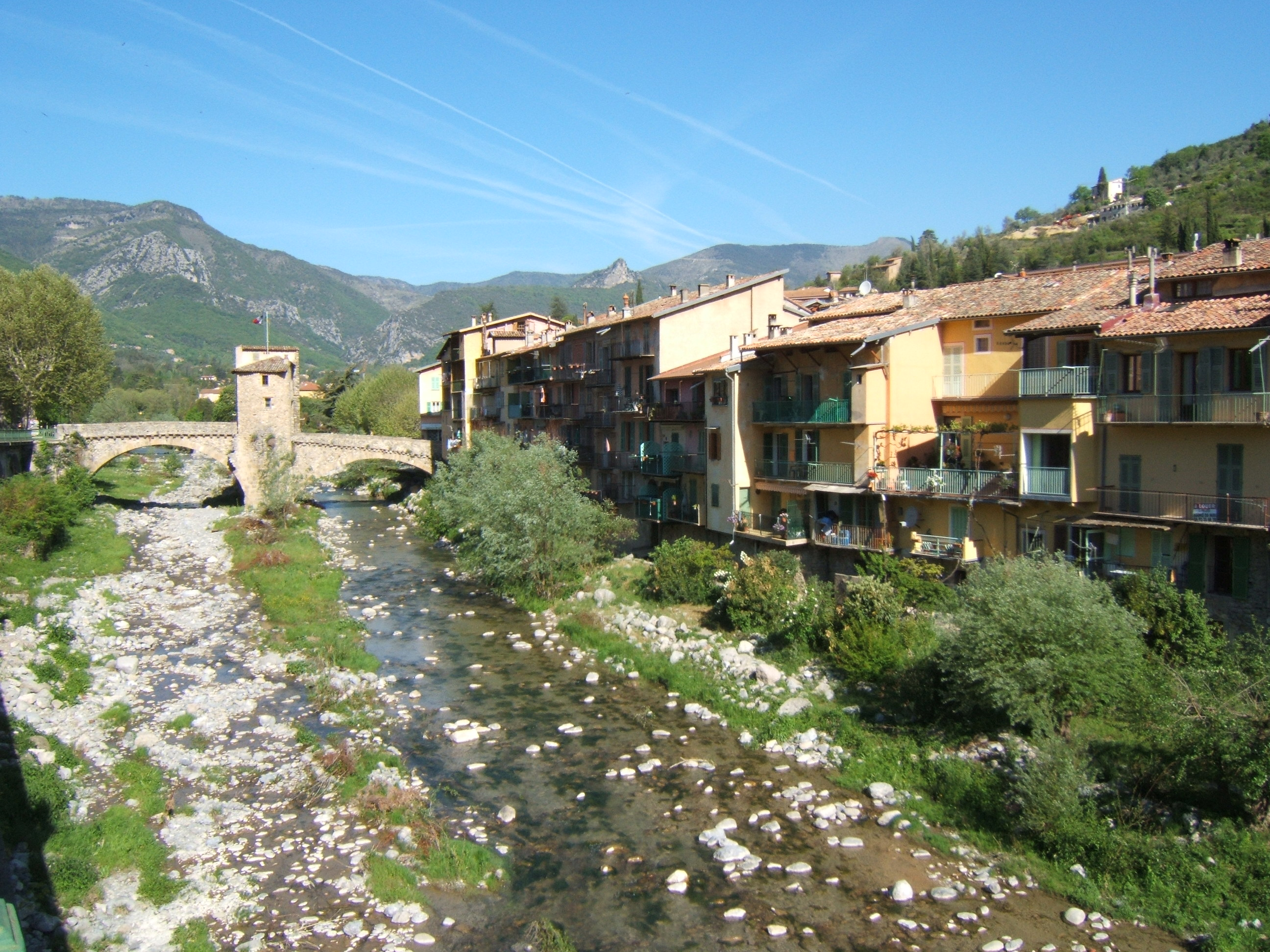 Sospel dans les Alpes-Maritimes. La Bevera y coule paisiblement, avec le Pont Vieux qui l'enjambe.